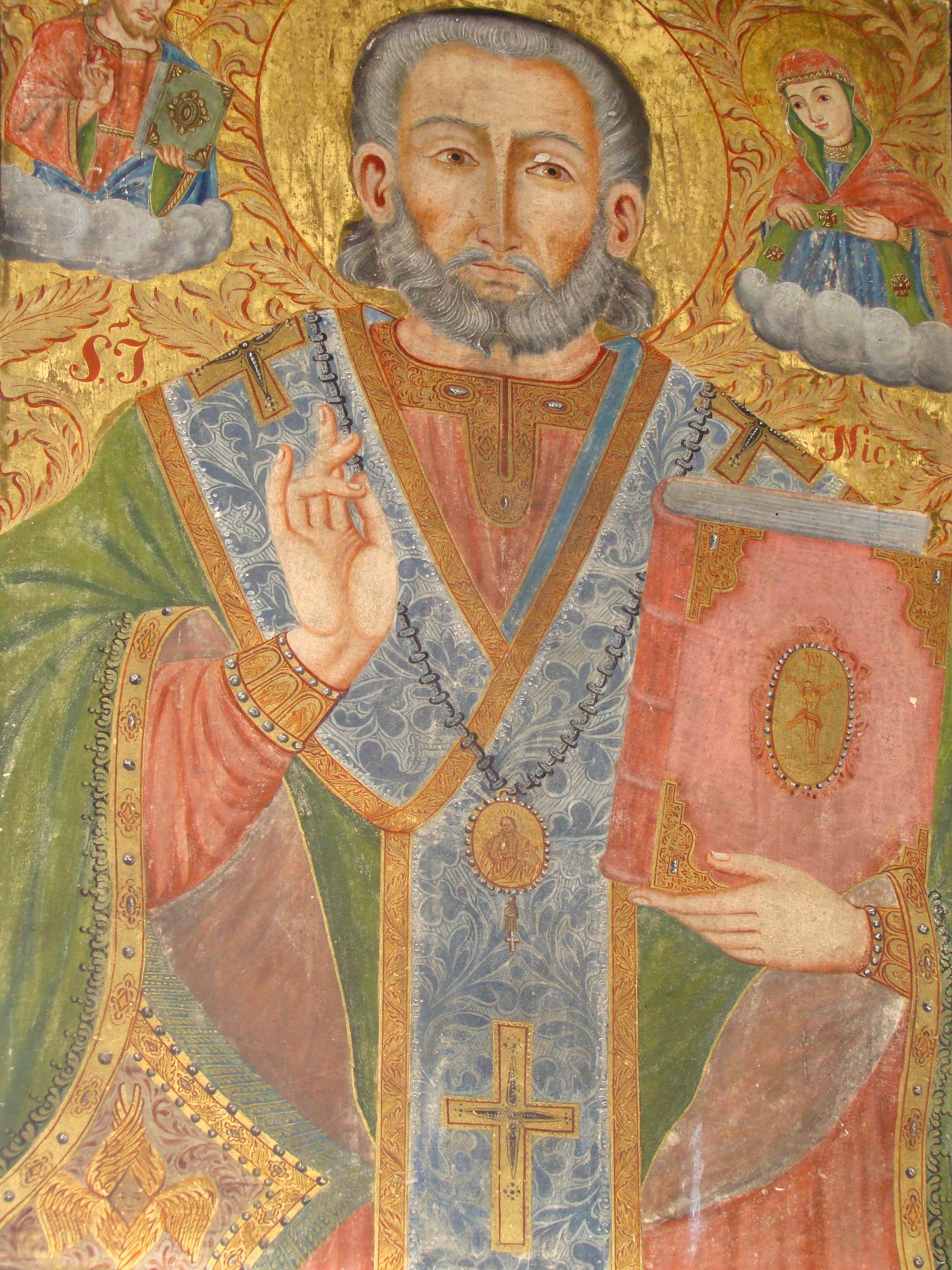 Biserica de lemn „Sf.Nicolae”, cătun Dric, județul Alba